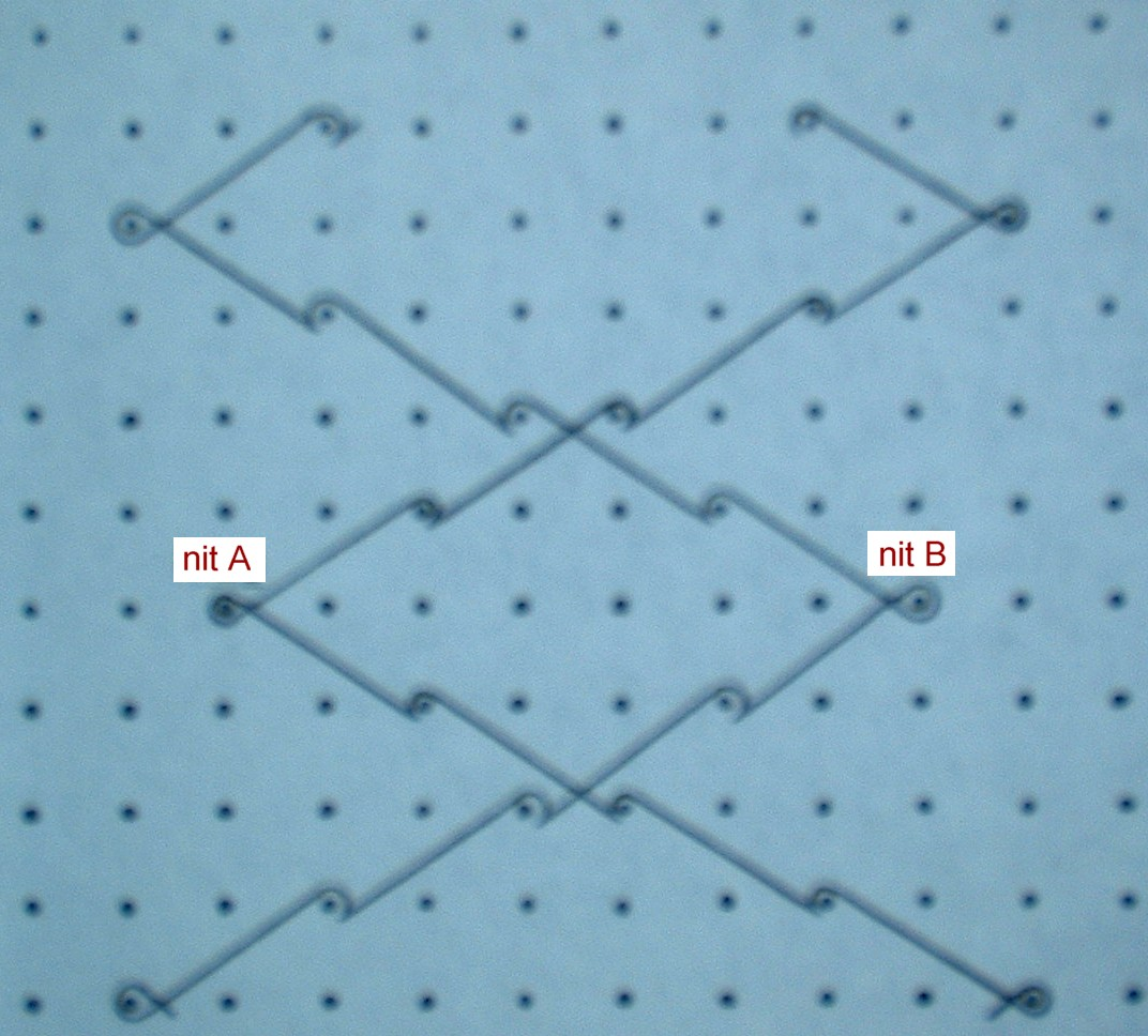 Doppel-Atlas = Legung der offenen, 4-reihigen hinterlegten Maschenbindung